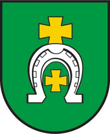 Herb gminy Szydłowo w województwie mazowieckim